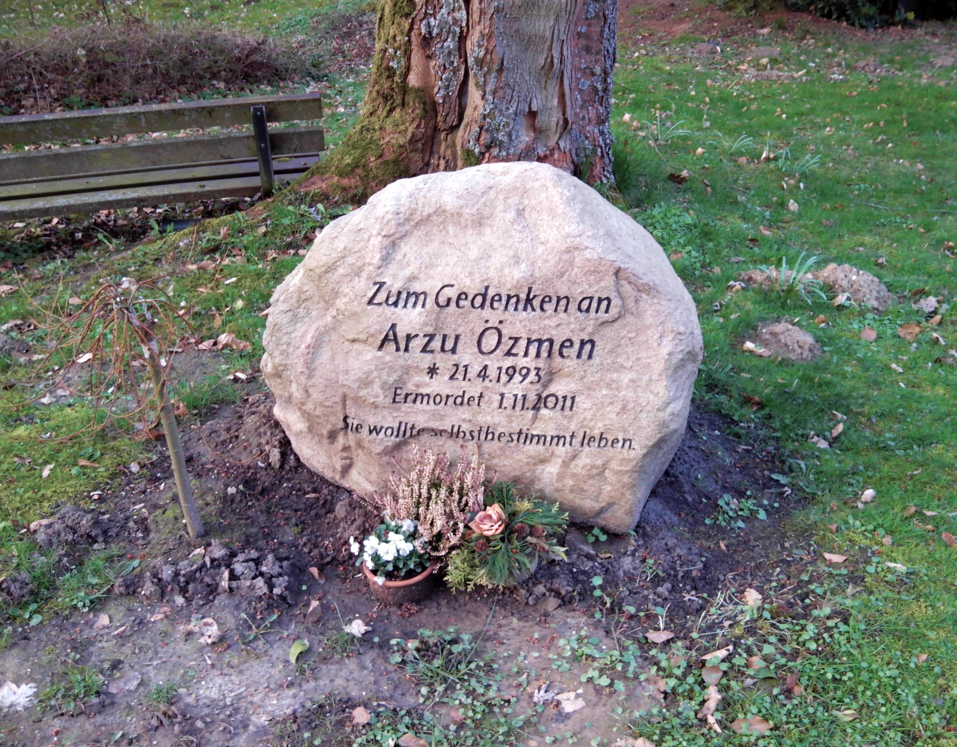 Gedenkstein für die von ihrer Familie ermordete Arzu Özmen auf dem Remmighauser Friedhof